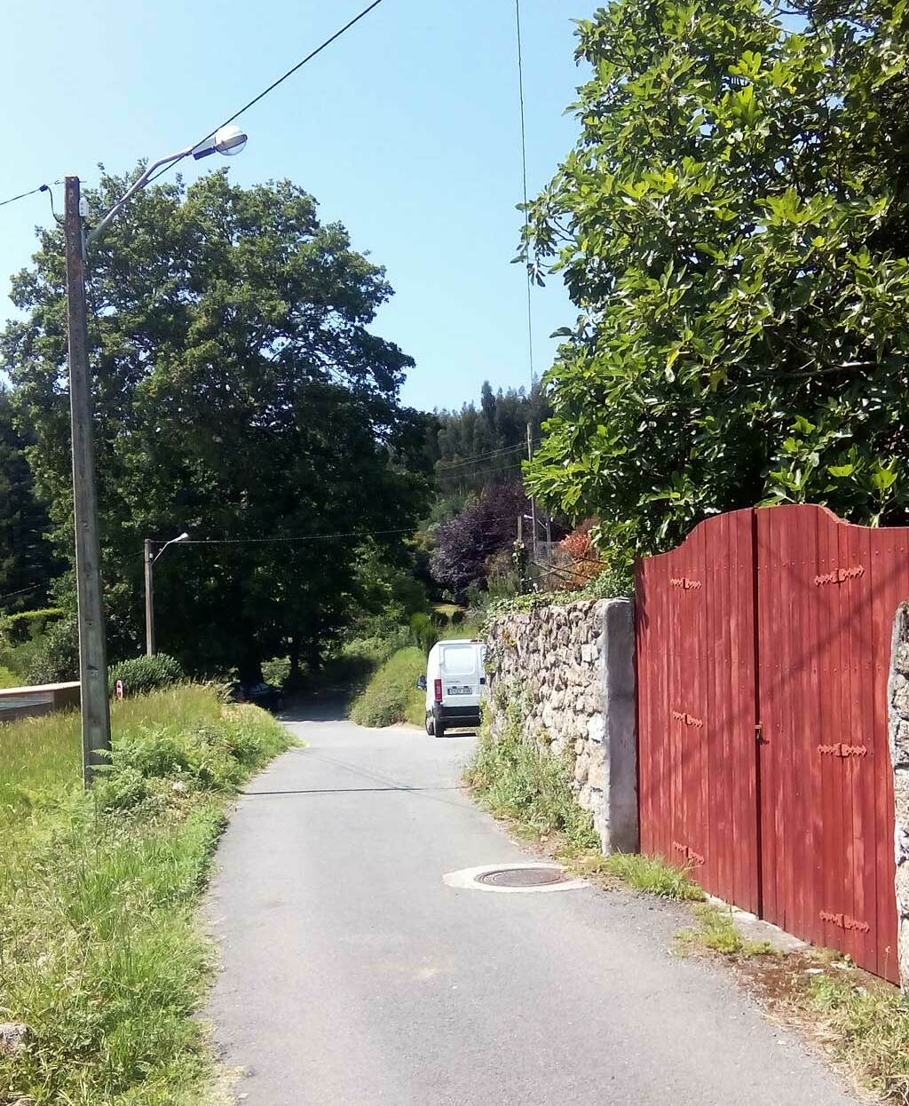 Acceso á Cabreira.